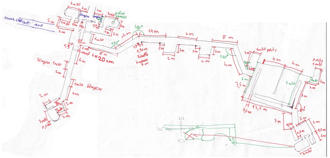 partie 1 du plan des souterrains du bunker de prat ar hastel